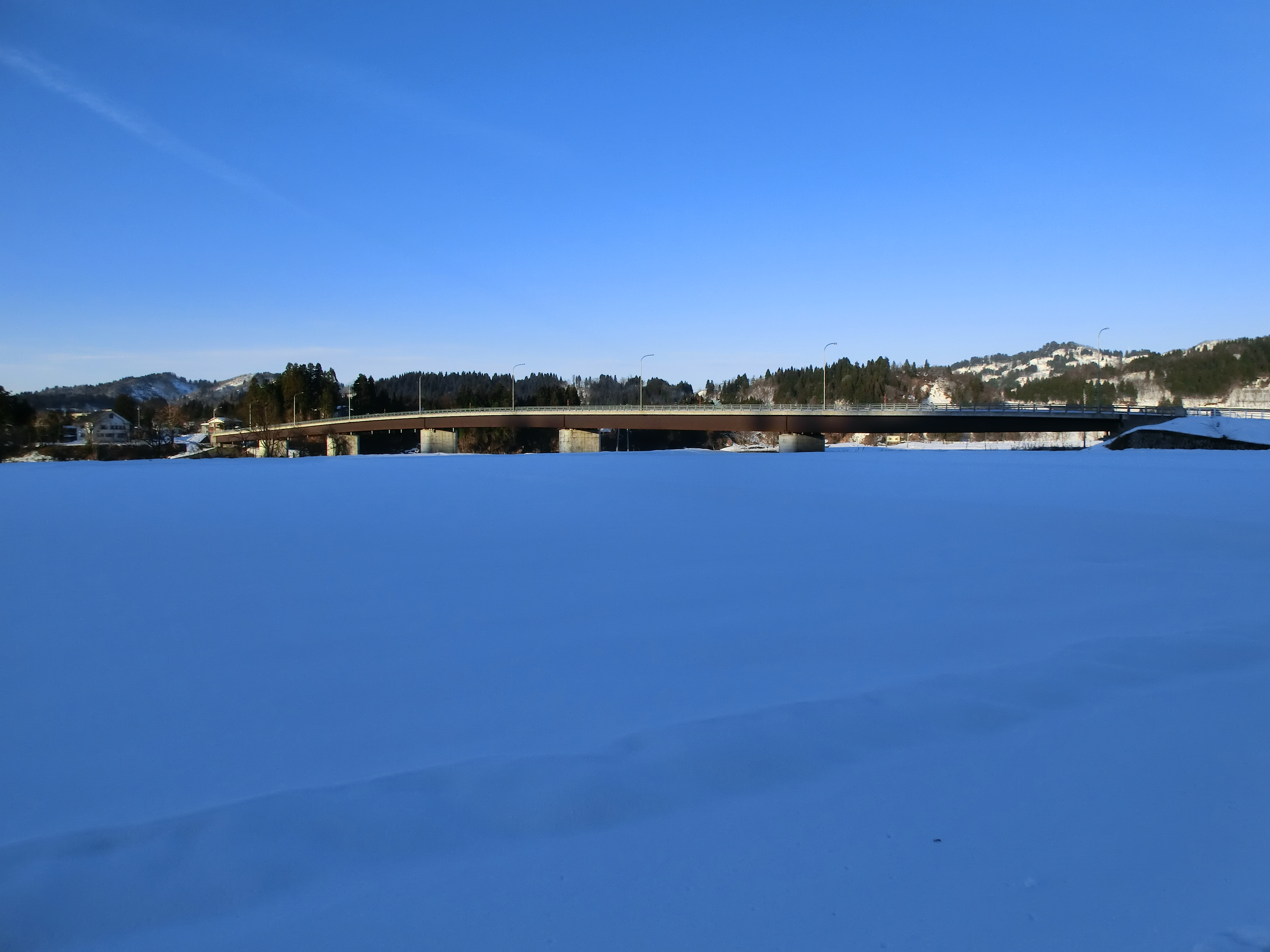 この画像は2014年1月7日投稿者によって、新潟県長岡市西川口西倉にて撮影された、牛ケ島大橋の写真。